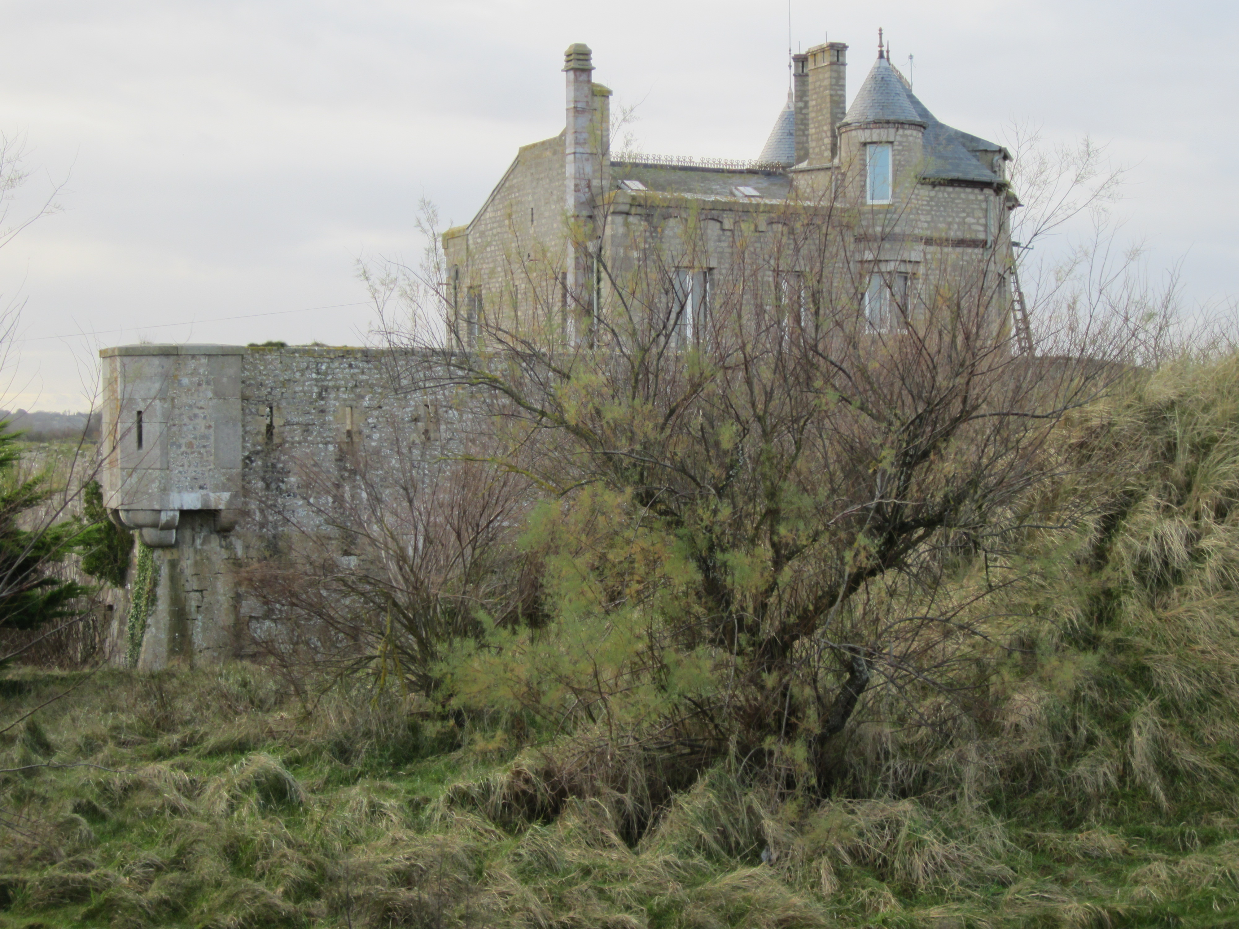 Ravenoville